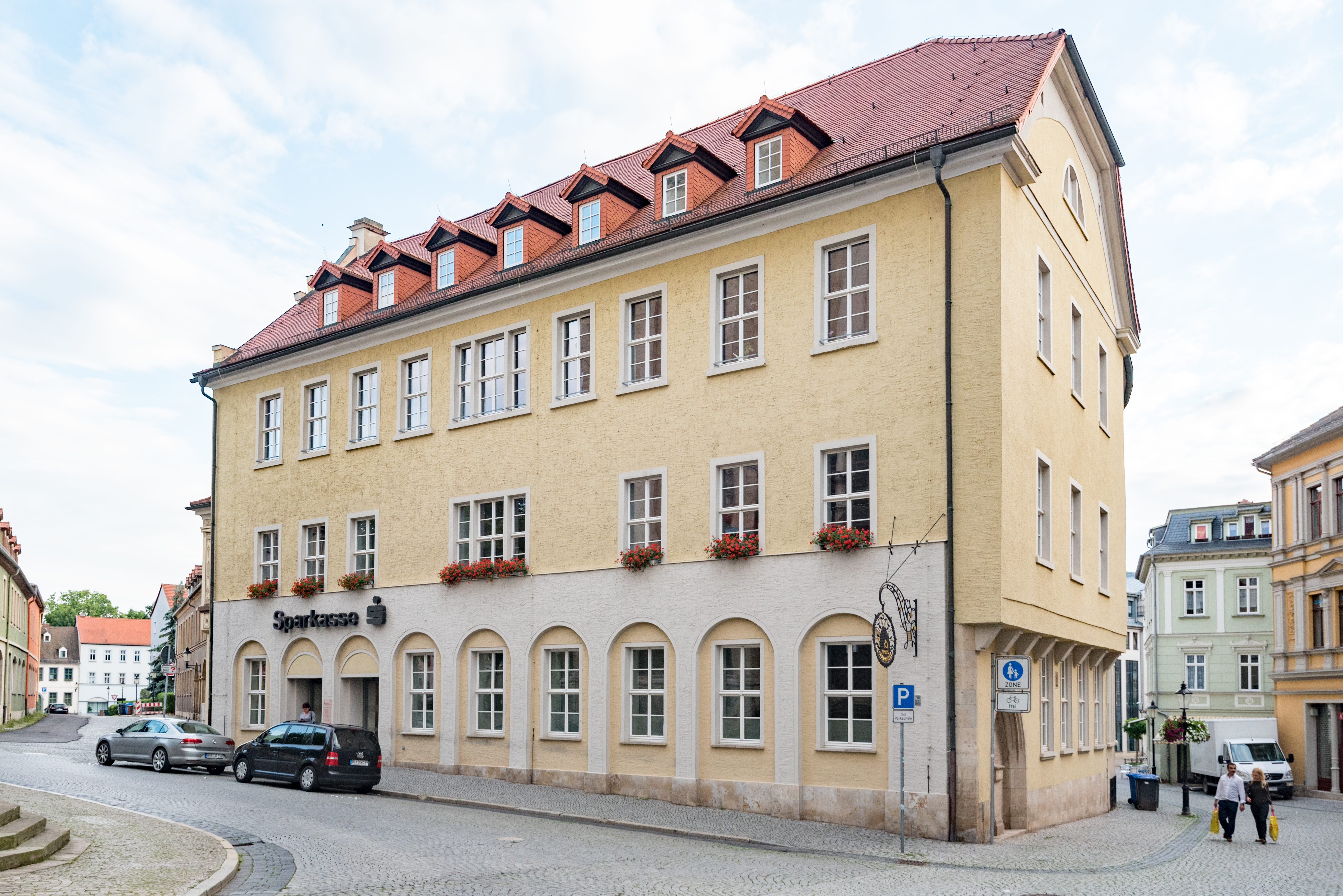 Naumburg (Saale), Topfmarkt 6